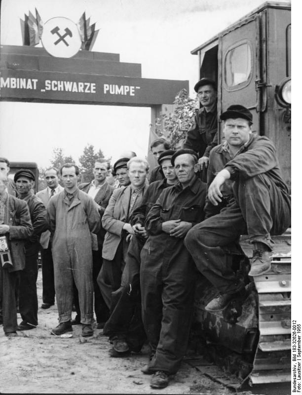 Hoyerswerda, Kombinat "Schwarze Pumpe", Arbeiter Zentralbild / Lausitzer, 1.9.55 Start für Kombinat "Schwarze Pumpe" Mit einem Festakt am 31.8.1955 begannen die Aufbauarbeiten für das Braunkohlen-Kokskombinat "Schwarze Pumpe" bei Hoierswerda im Bezirk Cottbus, eines der bedeutendsten Objekte des 2. Fünfjahrplans. Unter dem Beifall der Teilnehmer gab der Minster für Schwerindustrie der Deutschen Demokratischen Republik Fritz Selbmann das Zeichen zum Beginn des Baues, indem er die erste Planierraupe vom Festplatz auf den Anfang einer 3,7 km langen künftigen Werkstrasse lenkte. UBz: Arbeiter während der Ansprache von Minister Selbmann.